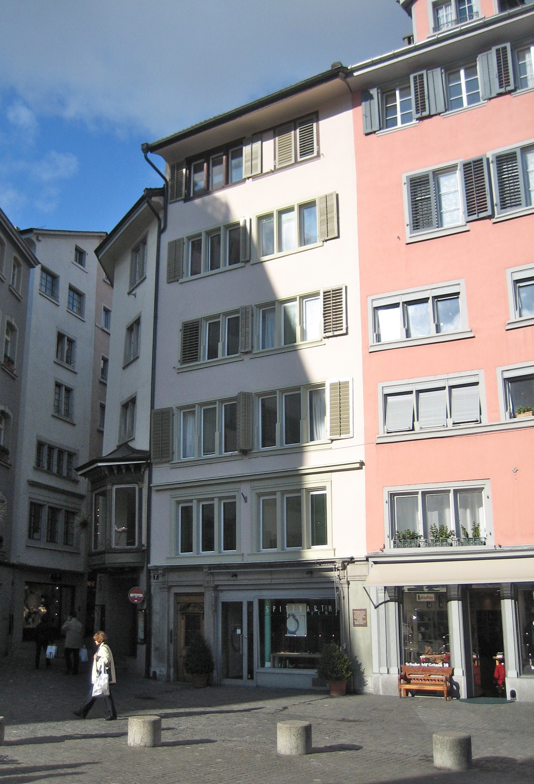 Geburtshaus von Ida Bindschedler am Weinplatz in Zürich: Haus zum «Gwölb», Weinplatz 7